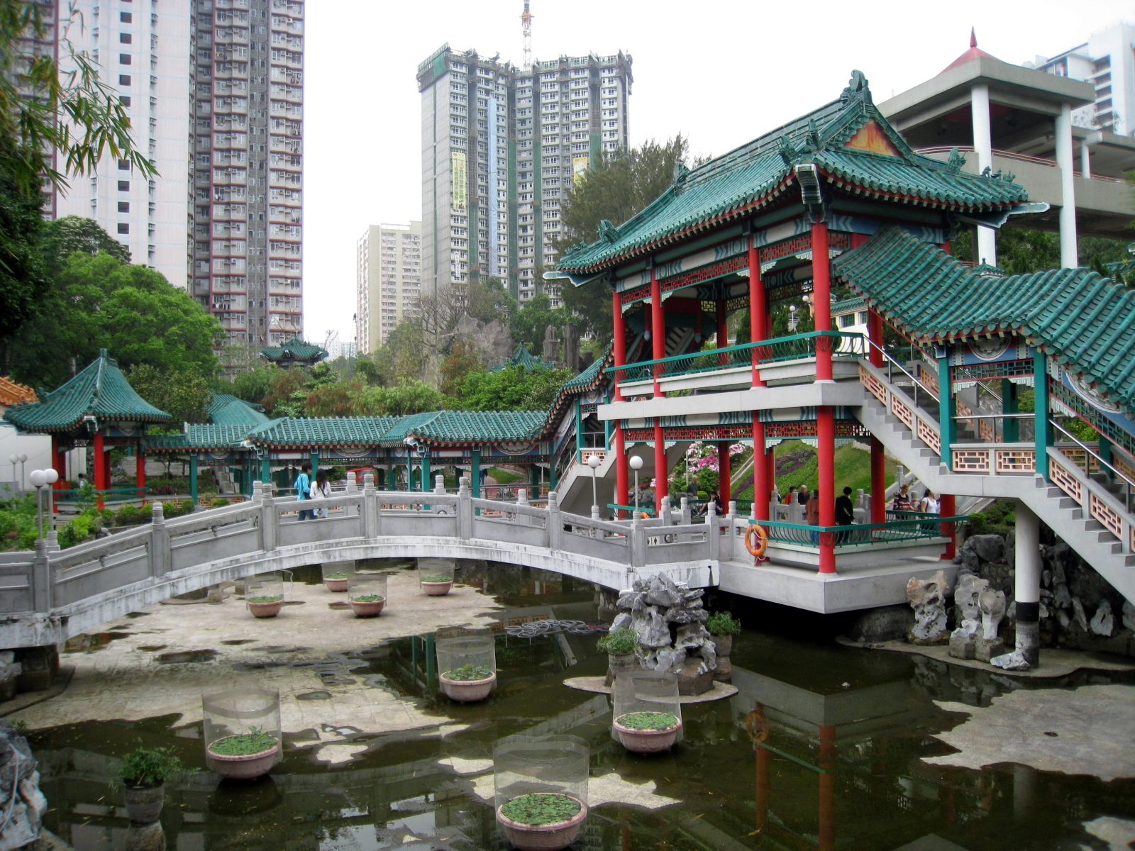 HK Good Wish Garden in Wong Tai Sin